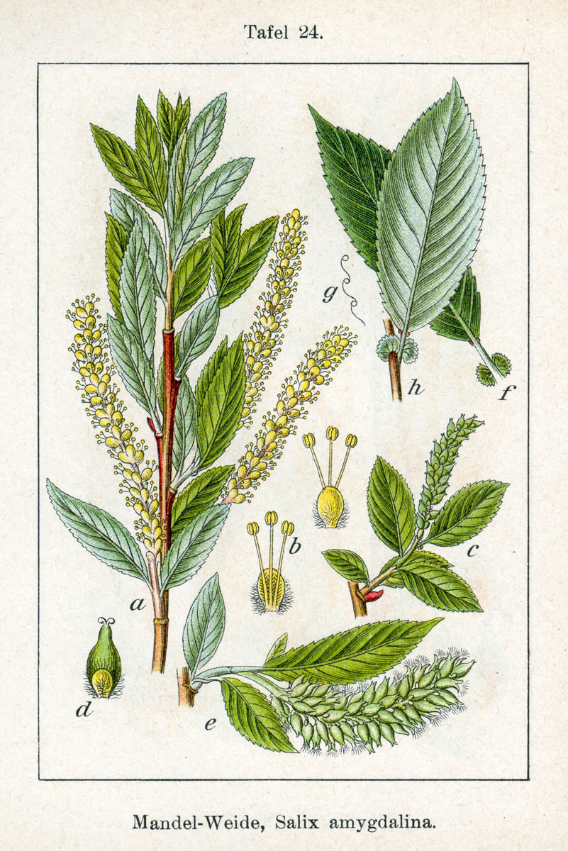 Mandel-Weide, Salix triandra subsp. triandra, syn. Salix amygdalina L. Original Description Mandel-Weide, Salix amygdalina